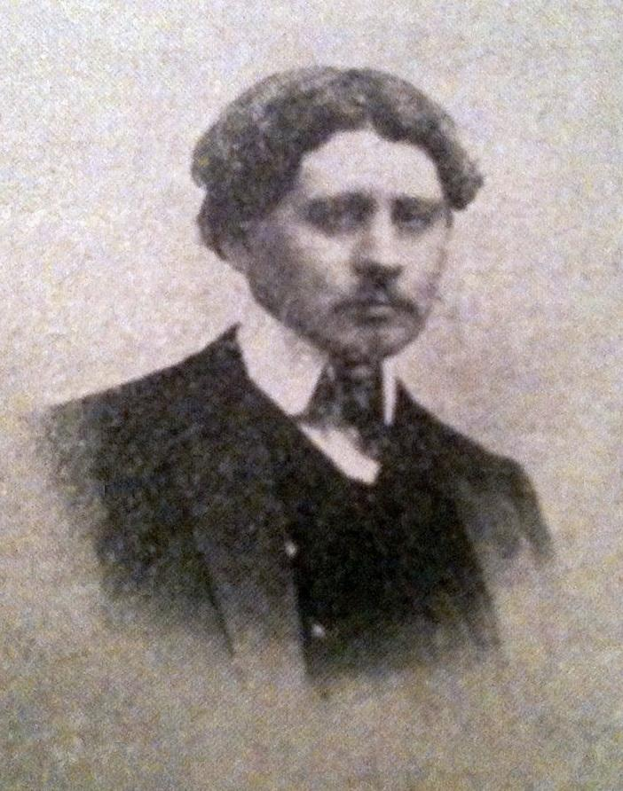 Portrait photographique de Gaston de Pawlowski reproduit dans La Vie au grand air du 11 février 1904, page 4. Photographer : unknown.